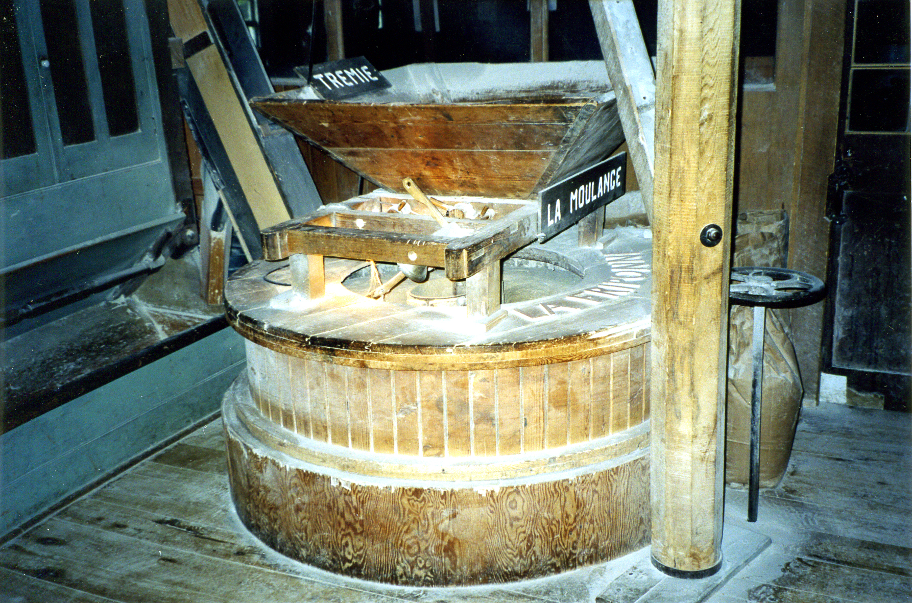 Moulange du Moulin de la chute à Maillou, aussi connu sous Moulin Labrie, à Beaumont (Chaudière-Appalaches, Québec). Surnommée «La friponne», en mémoire d'Angélique des Méloïses, épouse du seigneur Hugues Jacques Péan, à cause de l'exploitation des censitaires qui se faisait au moulin de Péan à Beaumont. Moulin à eau; moulin à farine; moulin à scie.